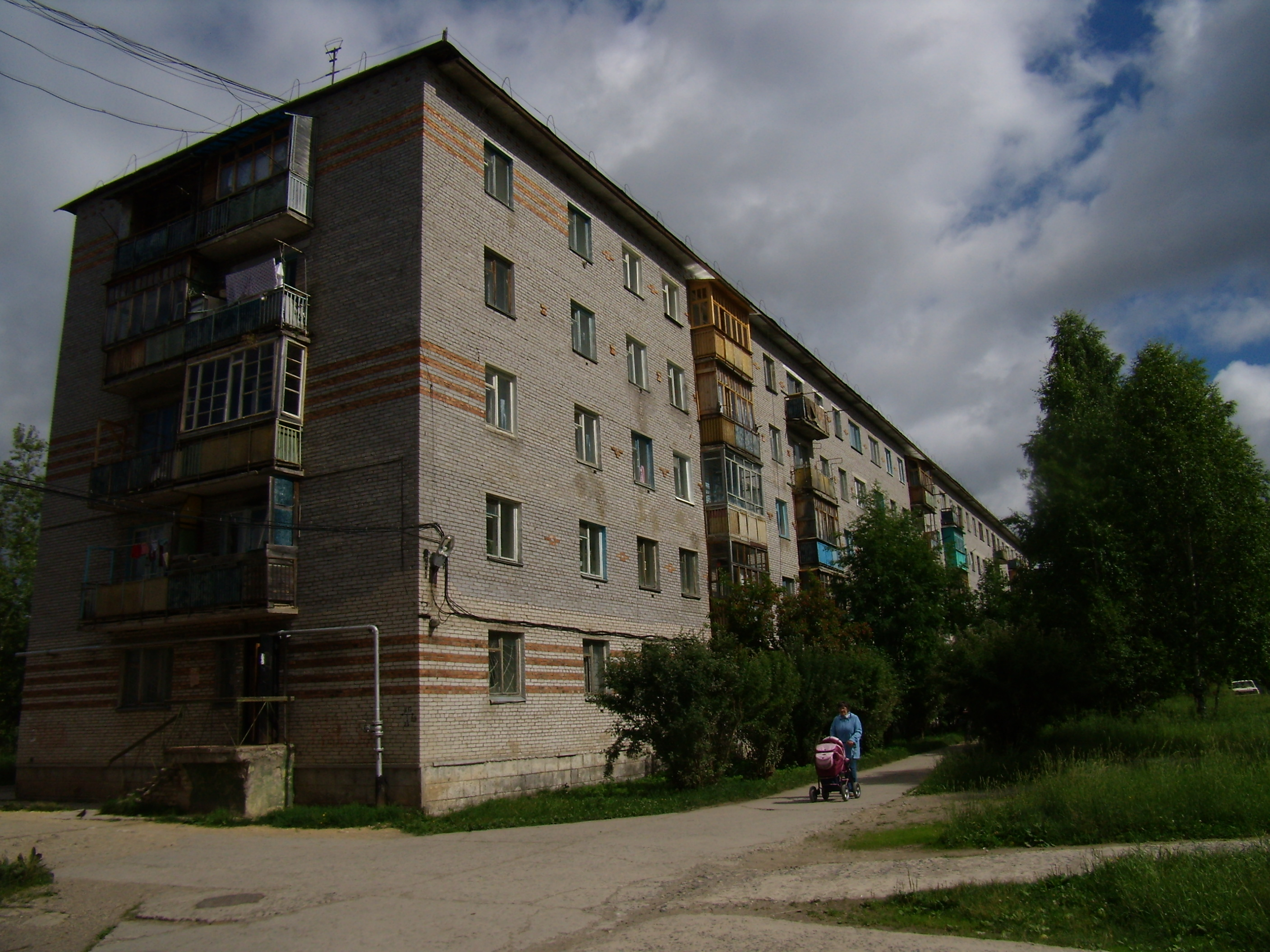 Первый дом в п. Североонежск